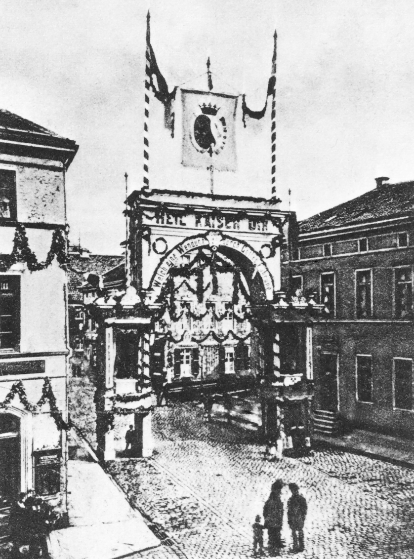 Im Bereich des einstigen Stadttores war 1877 dieser Triumphbogen in der Limbecker Straße errichtet worden. Grund war der Besuch von Kaiser Wilhelm I. am 2. September 1877 in Essen. Den Bogen schmückte zuoberst eine Fahne mit dem Essener Stadtwappen. Im Bogen stand gekrümmt die Inschrift: Welch eine Wendung durch Gottes Fügung!; das schrieb Wilhelm I. am Sedantag.